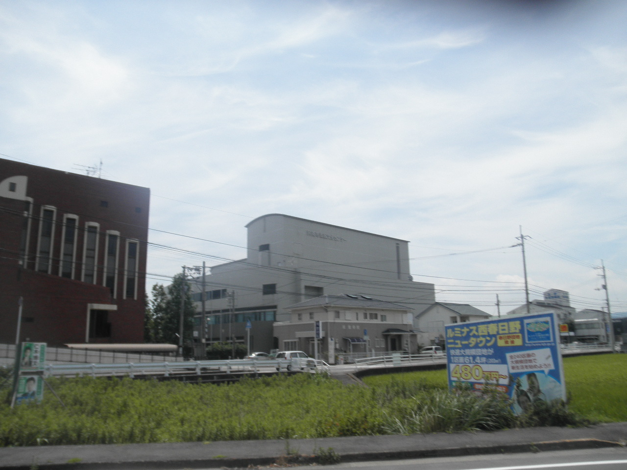 羽ノ浦図書館